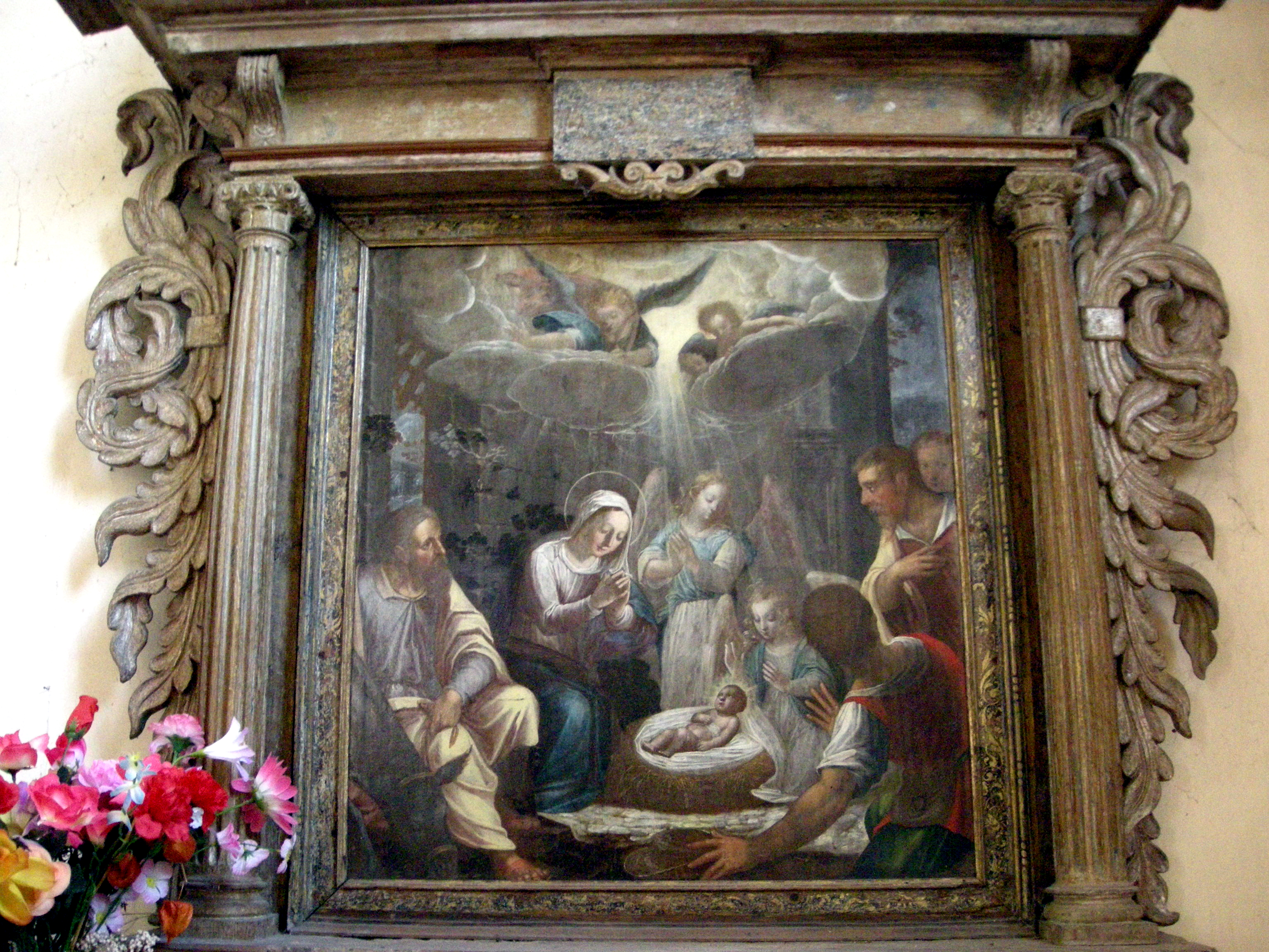 L'Adoration des bergers (Claude Bassot, 1620) dans l'église de Coinches (département des Vosges)